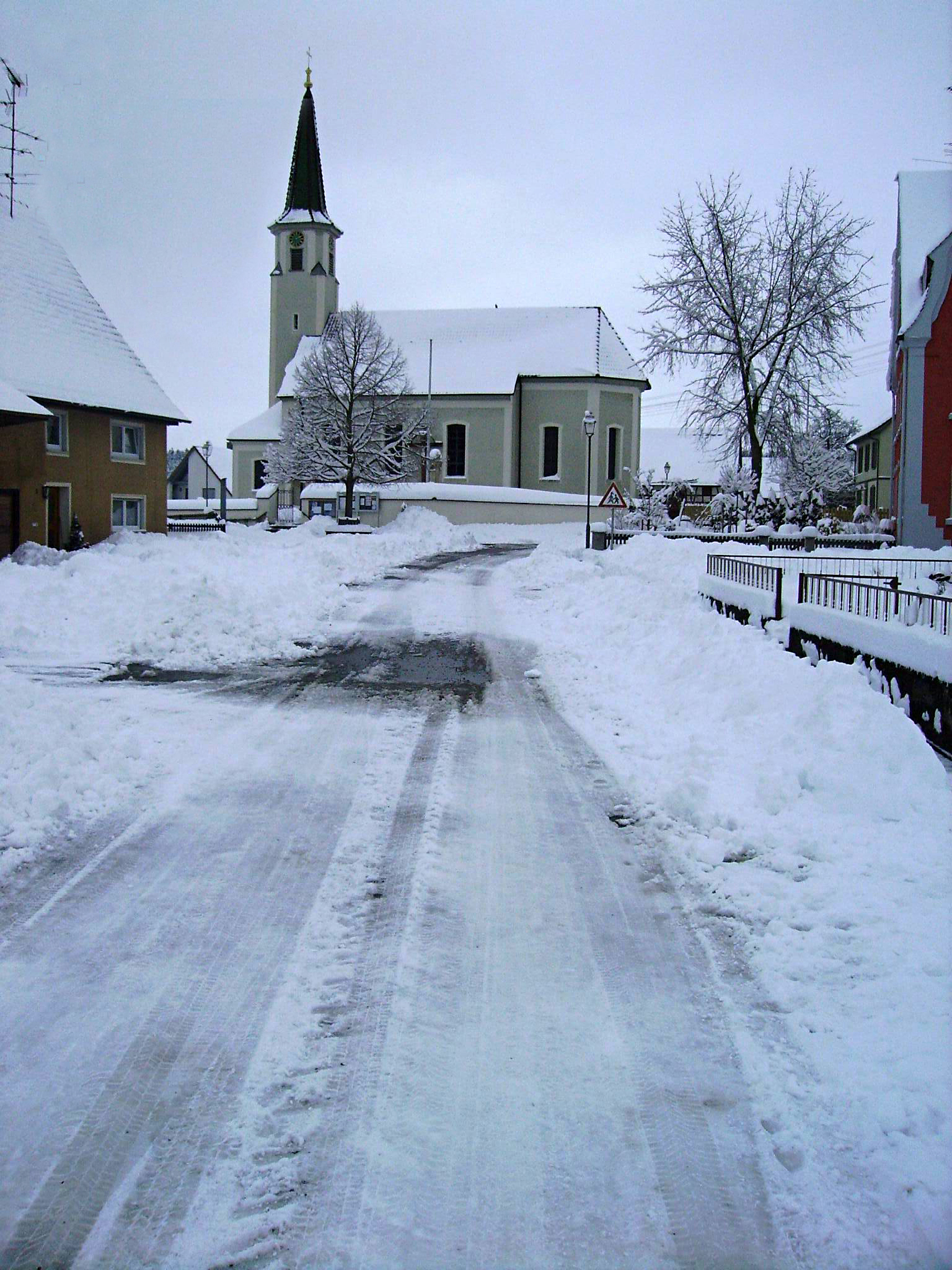 Kirche Bolstern am 05.03.06 von TyborBe1 mit Pentax Kamera aufgenommen